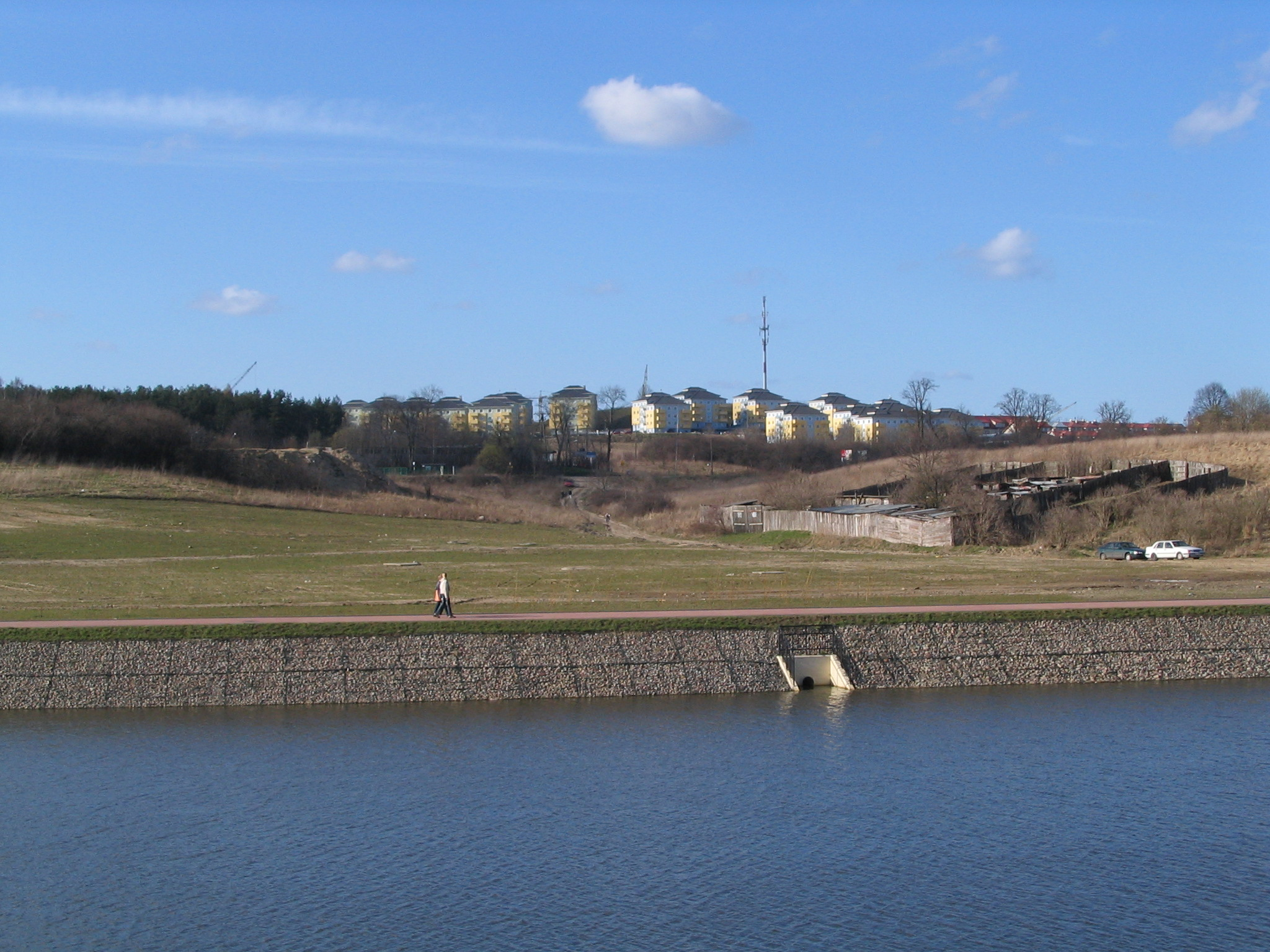 Osiedle Pogodne, part of Ujeścisko in Gdańsk, view from south